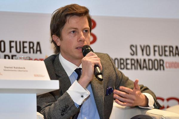 Camara de Comercio de Bogotá